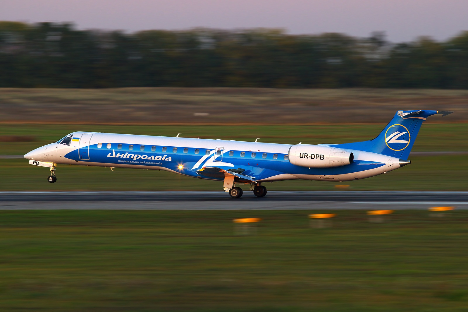 Embraer EMB-145LR (ERJ-145LR) Kiev - Borispol (KBP / UKBB) Ukraine, September 25, 2011 UR-DPB (cn 145250) As the sun brings its last ray...